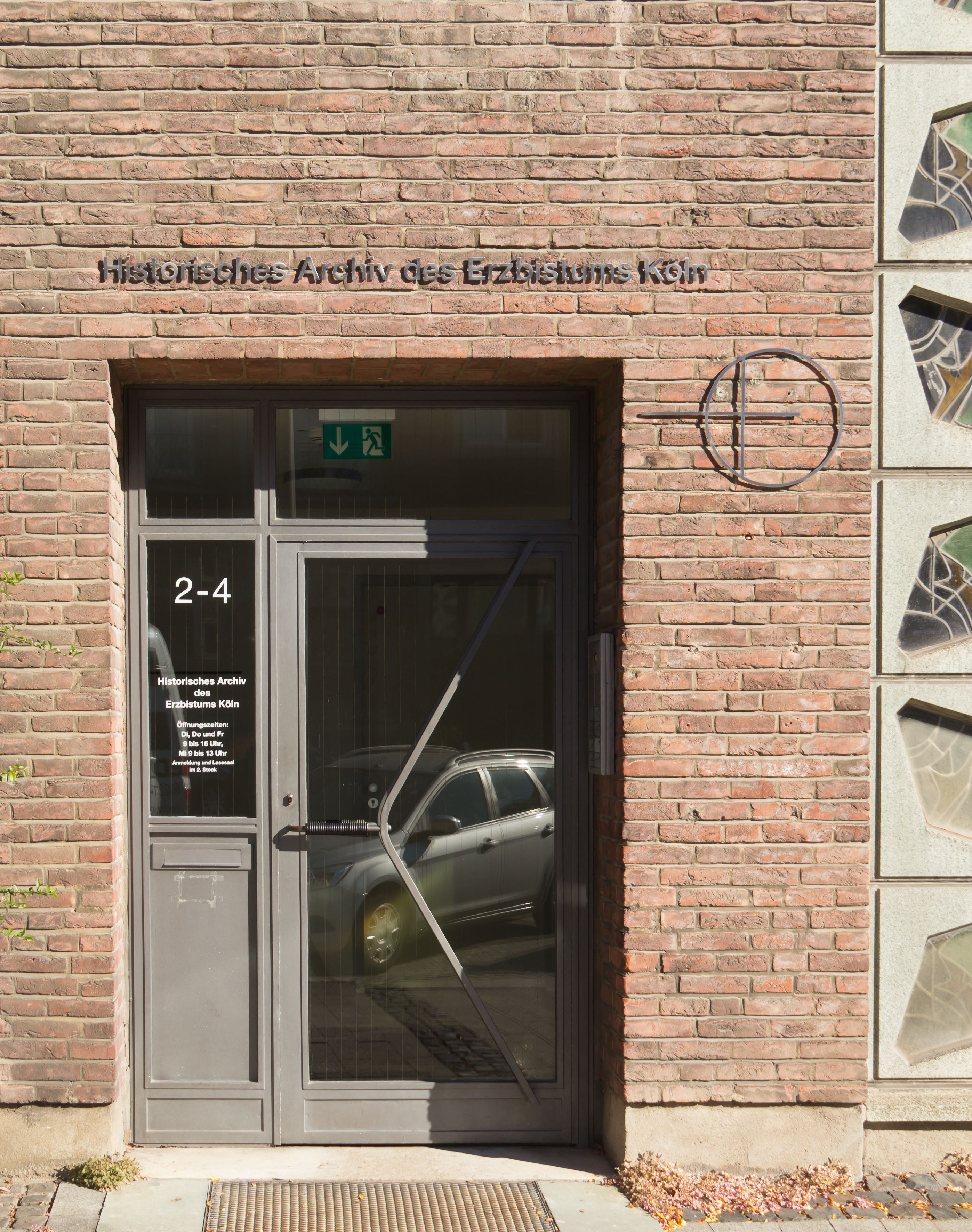 Denkmalgeschütztes Verwaltungsgebäude des Historischen Archivs des Erzbistums Köln, Gereonstraße 2-4 This is a photograph of an architectural monument.